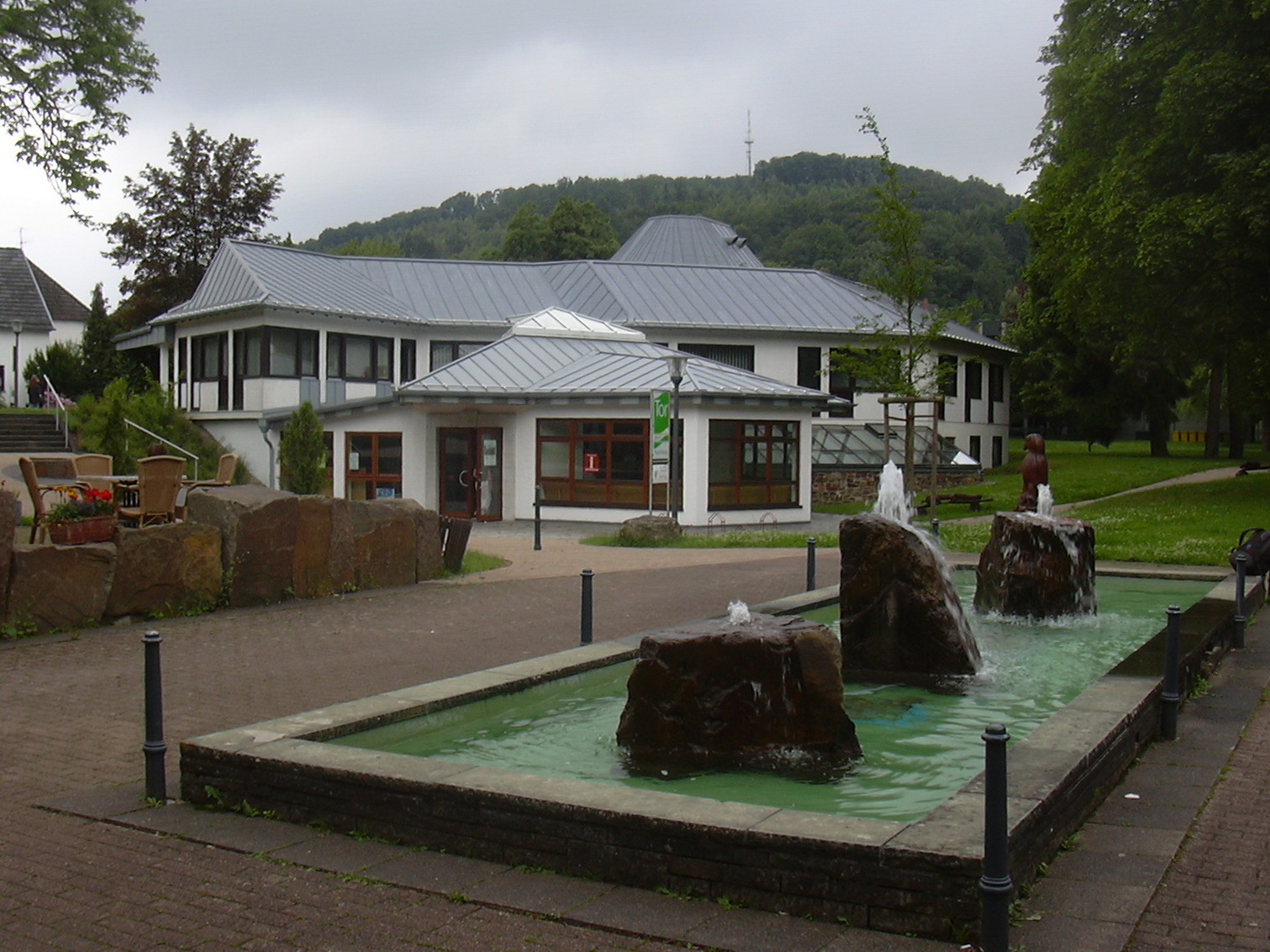 Gemünd, Northrhine-Westphalia; Spa